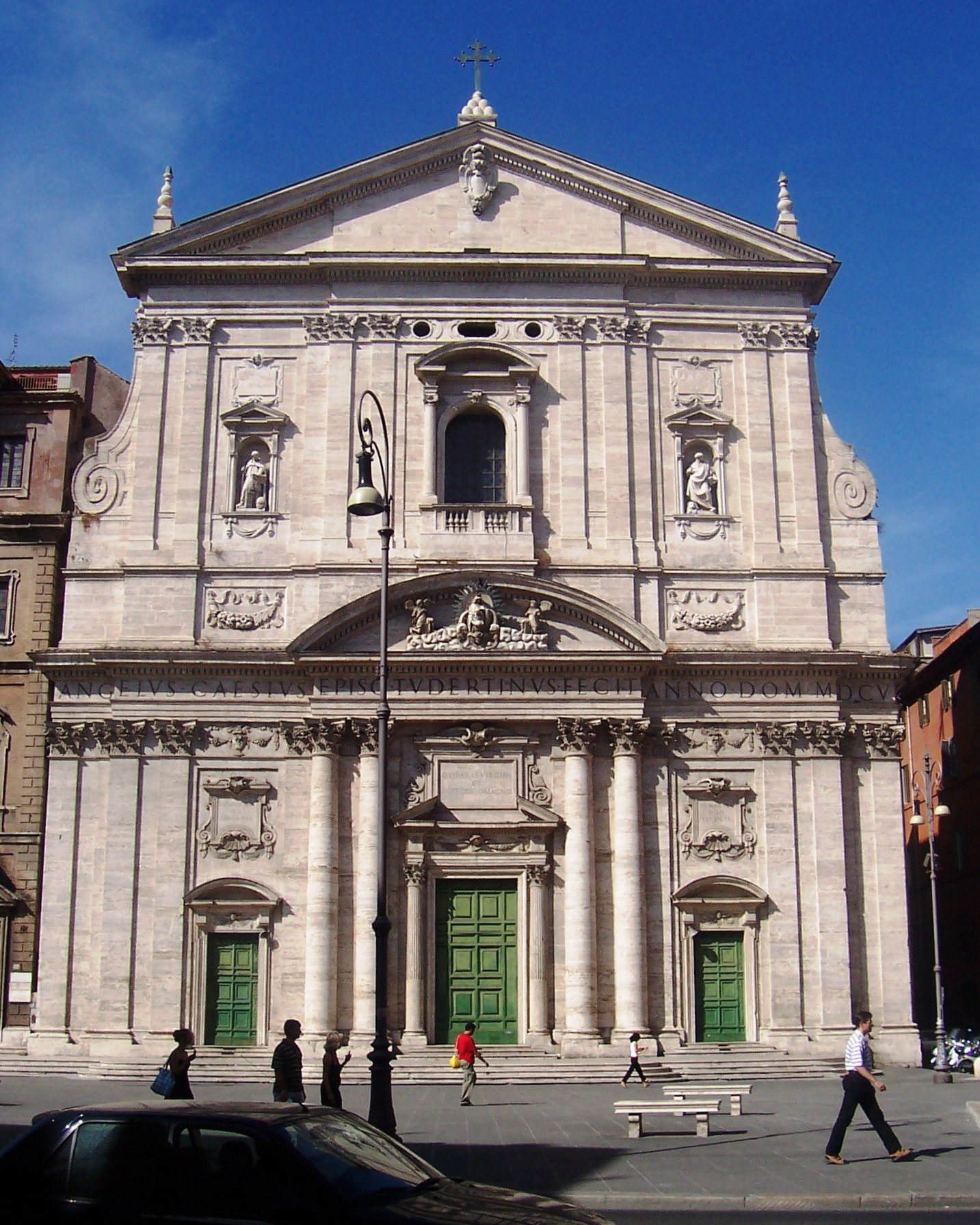 Santa Maria in Vallicella, Roma, 2004